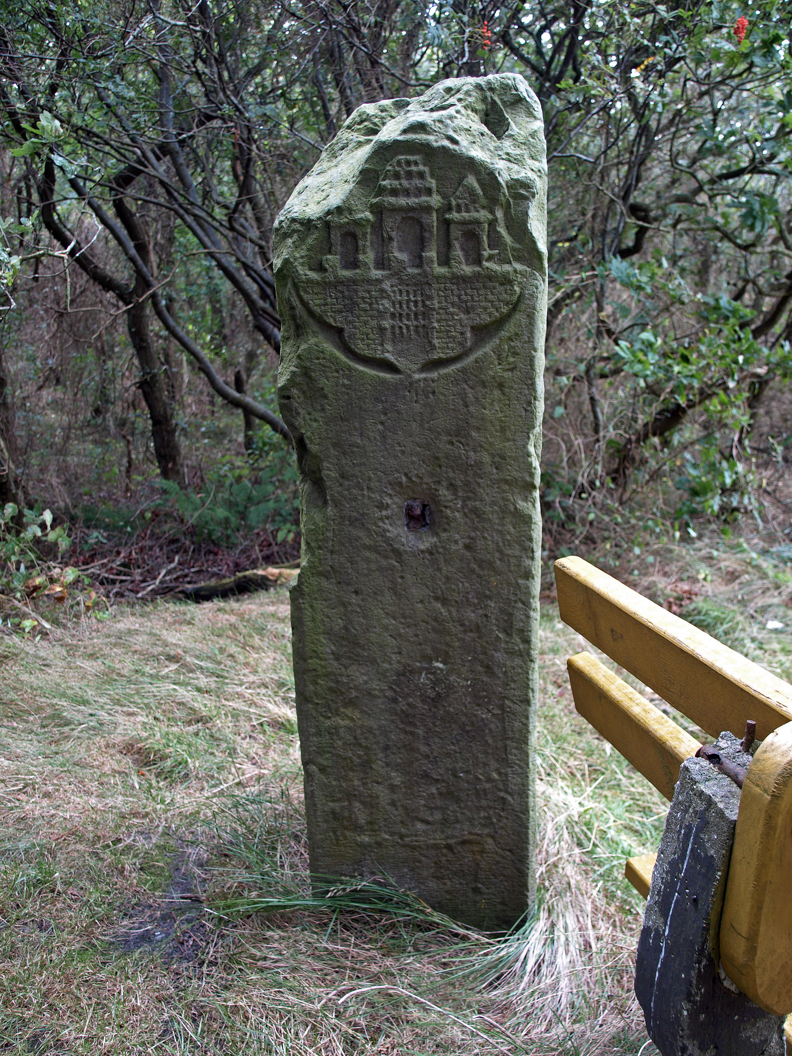 Grenzstein in Berensch aus dem Jahr 1589 - Ansicht Hamburger Wappen